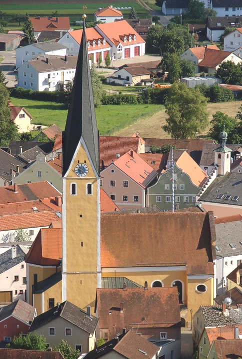 Stadtpfarrkirche Dietfurt, vom Kreuzberg aus gesehen